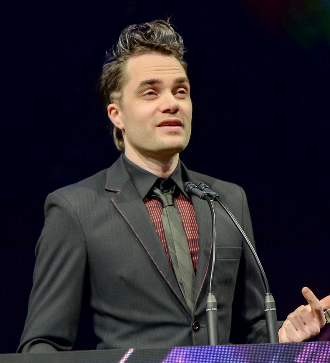 0D4_2274